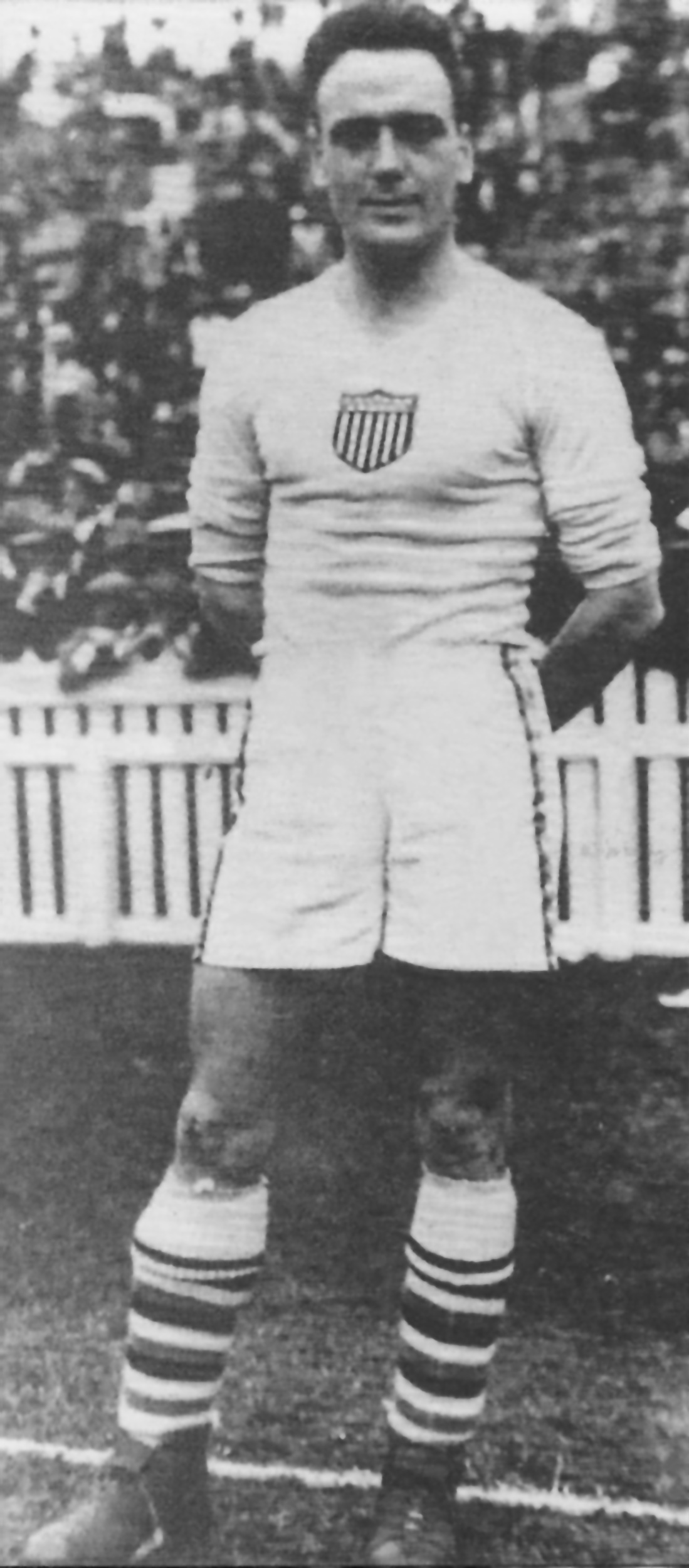 George Moorhouse